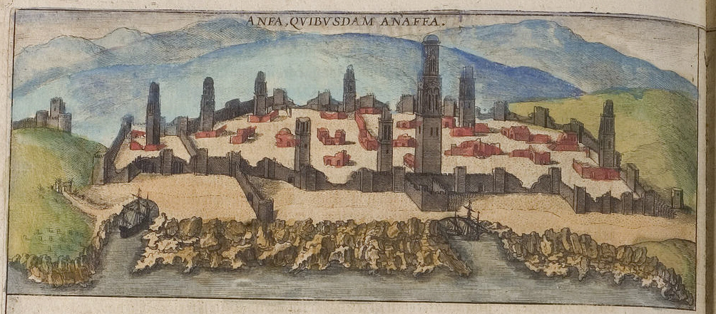 Anfa